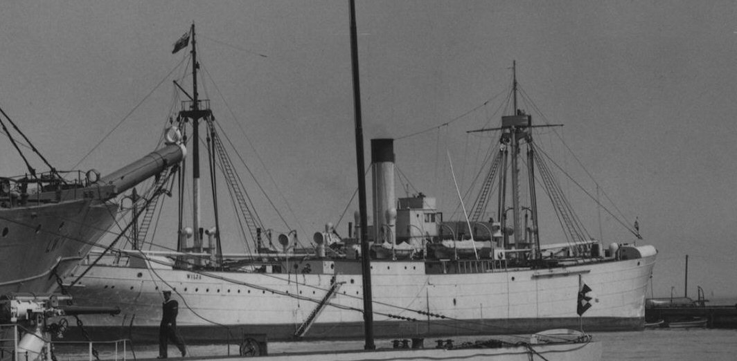 Okręt transportowy ORP "Wilja" w czasie Święta Morza.